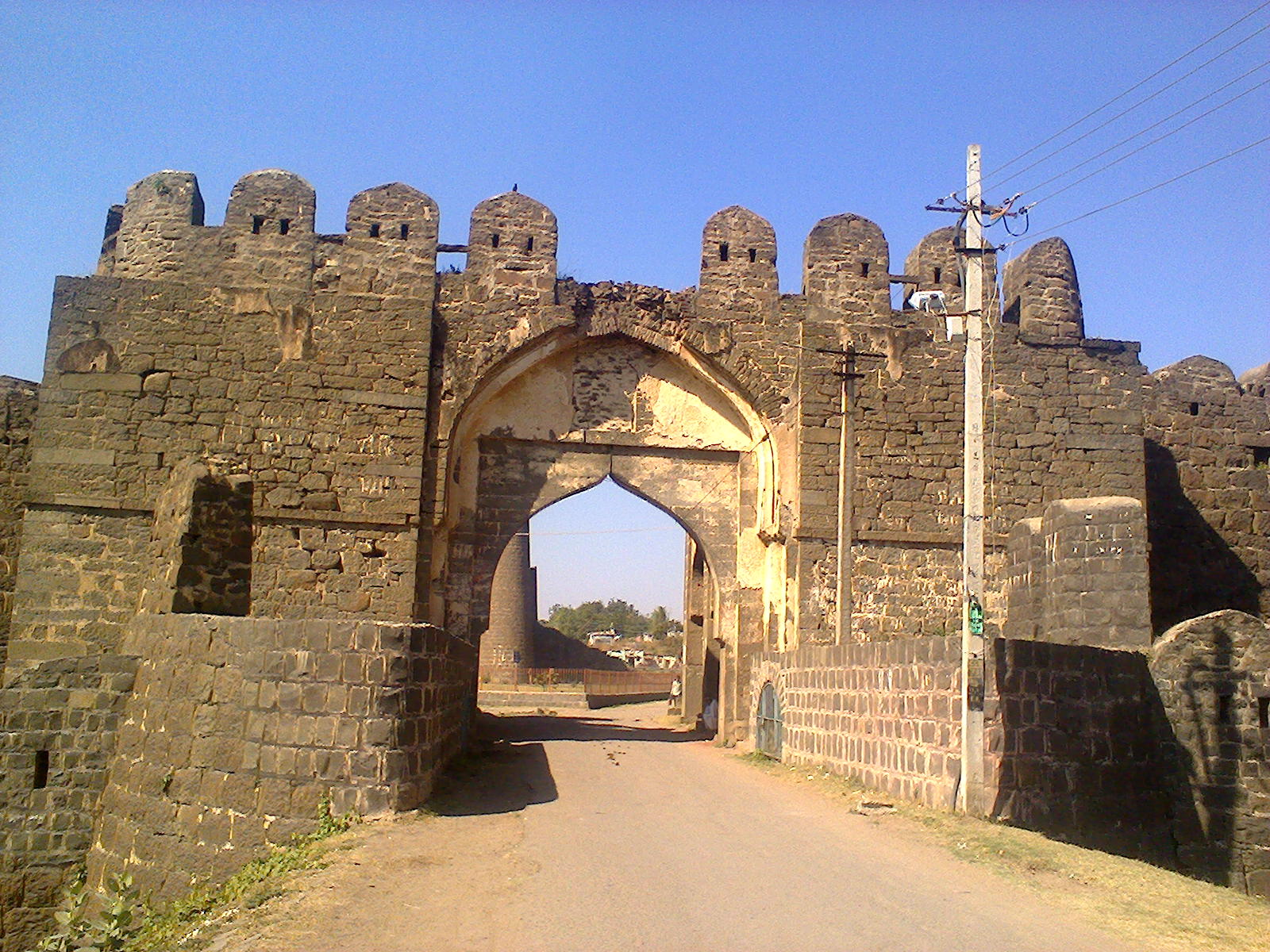 గుల్బర్గా కోట ప్రవేశద్వారం